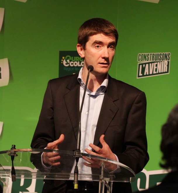 Sevran